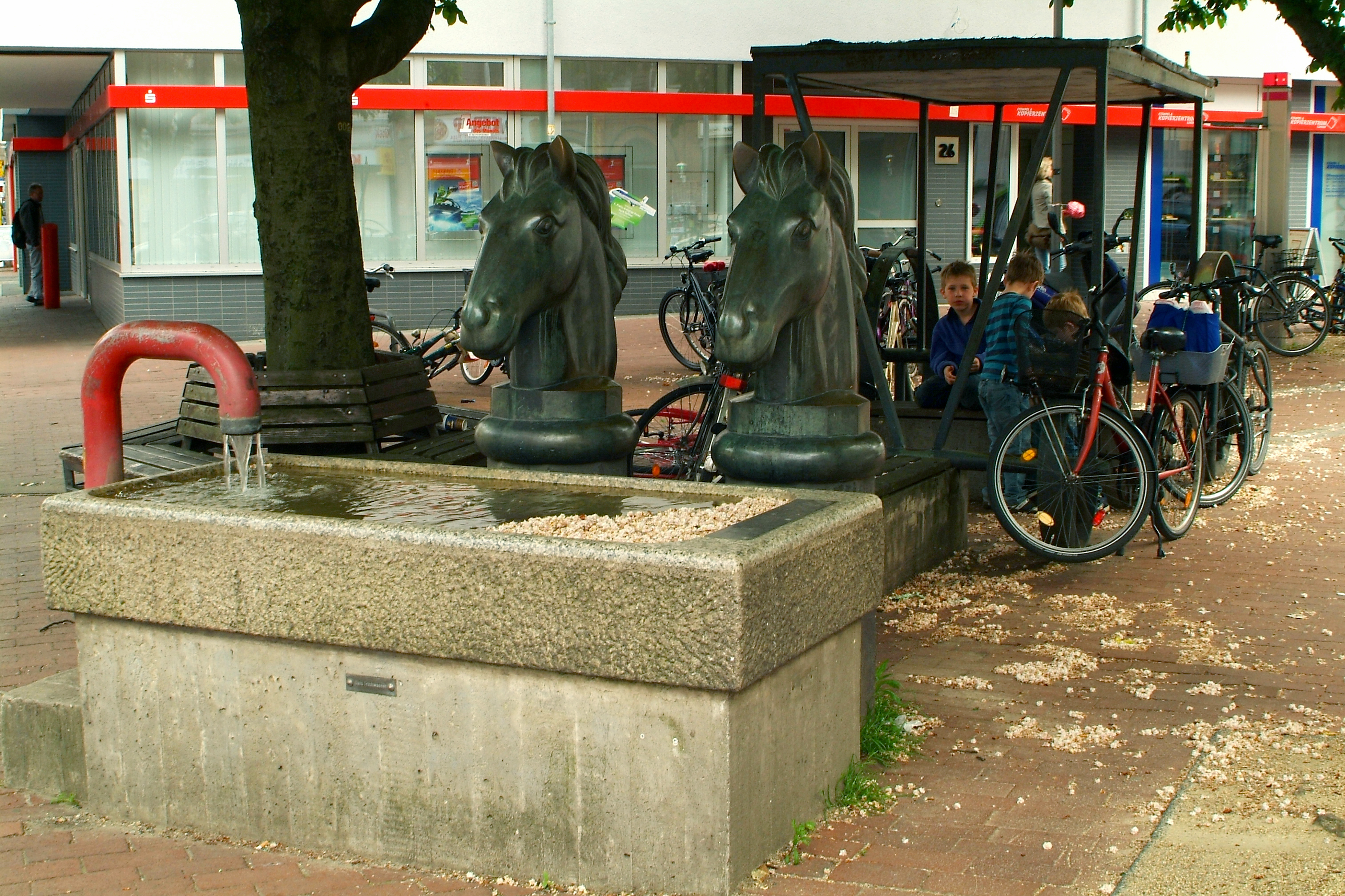 Den Pferdekutschenbrunnen von Max Sauk haben Kinder zum Spielen entdeckt.